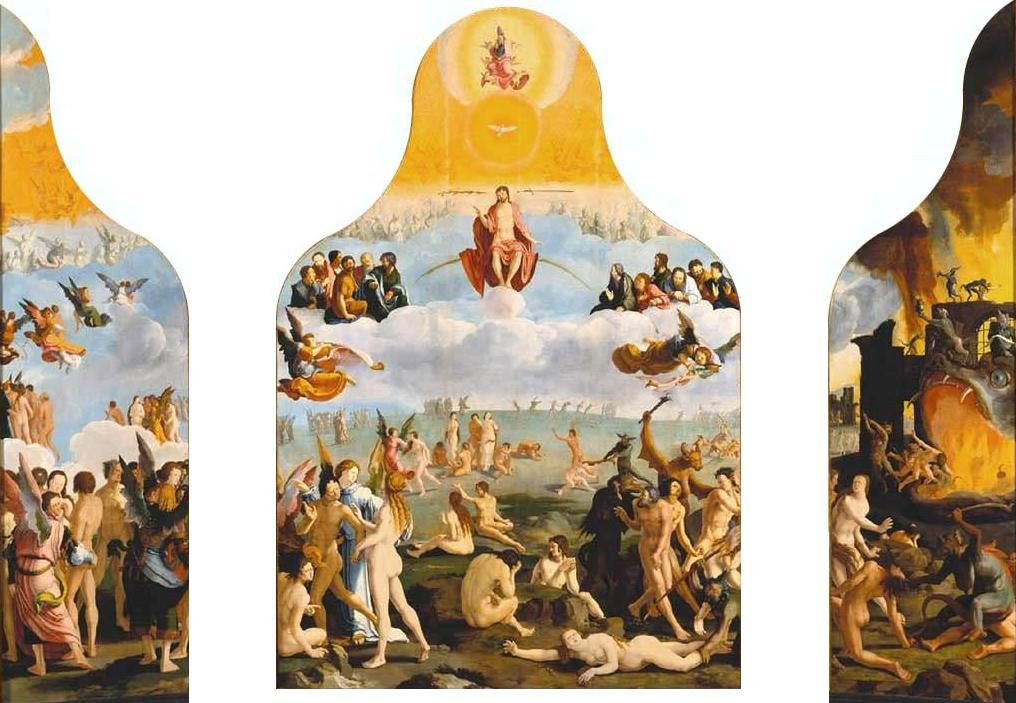 Het laatste oordeel, schilderij van Lucas van Leyden.